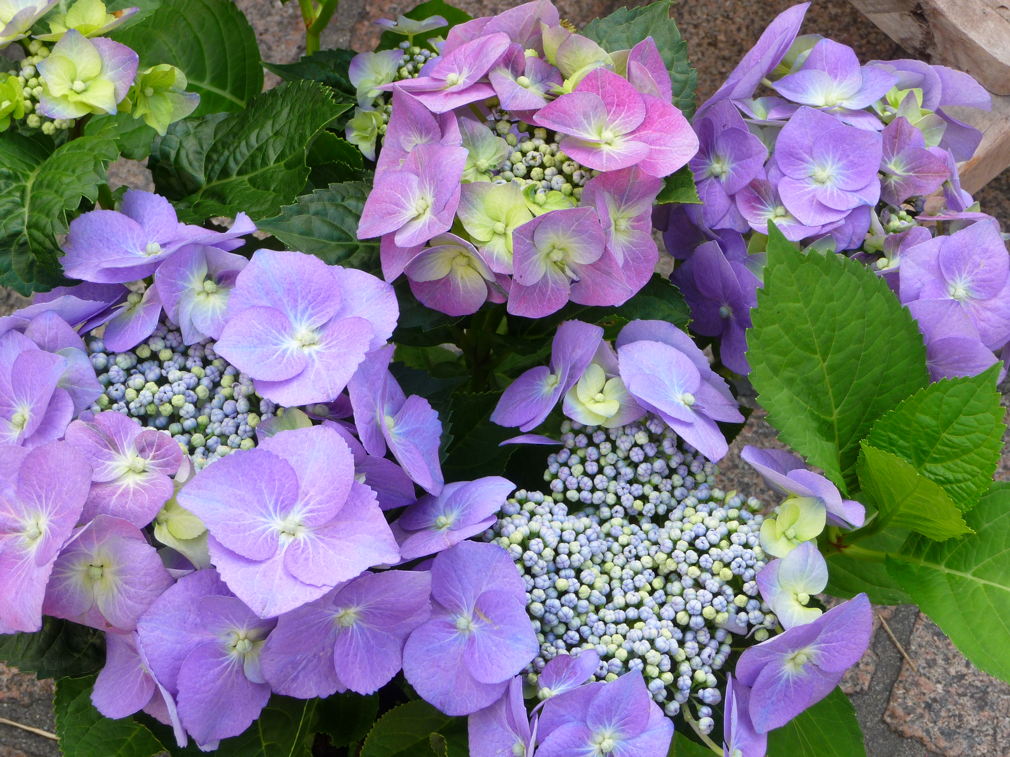 Bauernhortensie auf einem Wochenmarkt in Speyer